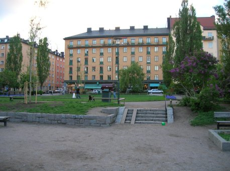 Nytorget, Stockholm, gräsplanen. Fotograf : Jordgubbe, juni 2005 Public Domain